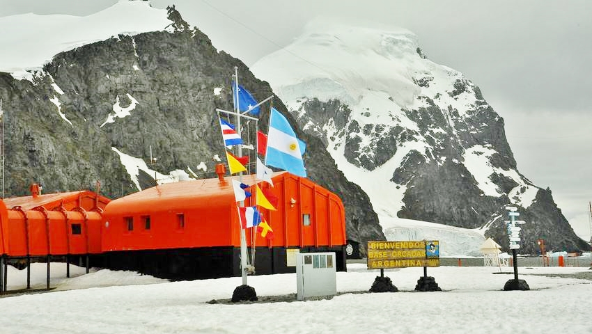 Profesionales de distintas disciplinas llevan adelante proyectos científicos para analizar la flora y la fauna y realizar mediciones meteorológicas en la base antártica Orcadas, en el marco de la Campaña Antártica de Verano (CAV) 2017-2018, organizada por el Ministerio de Defensa. Esa base, que es la mas antigua del continente antártico, funciona de manera permanente y cuenta con un Laboratorio Antártico Multidisciplinario (LABORC) que concentra todas las actividades científicas, entre ellas investigaciones sobre glaciología continental y marina, sismología y observaciones meteorológicas, estas últimas de manera continua desde 1903. Durante esta CAV fueron trasladados a bordo del rompehielos Almirante Irízar dos profesionales del Observatorio de Oceanografía y Geofísica Experimental (OGS) de Trieste (Italia) que desembarcaron en Orcadas para el desarrollo del proyecto “Red Sismológica Antártica”.